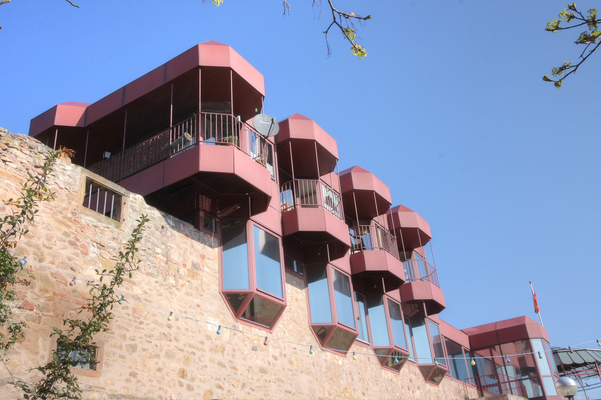 Bad Kreuznach, Kauzenburg; Architekt Gottfried Böhm (*1920) Pritzker-Architektur-Preis Träger 1986